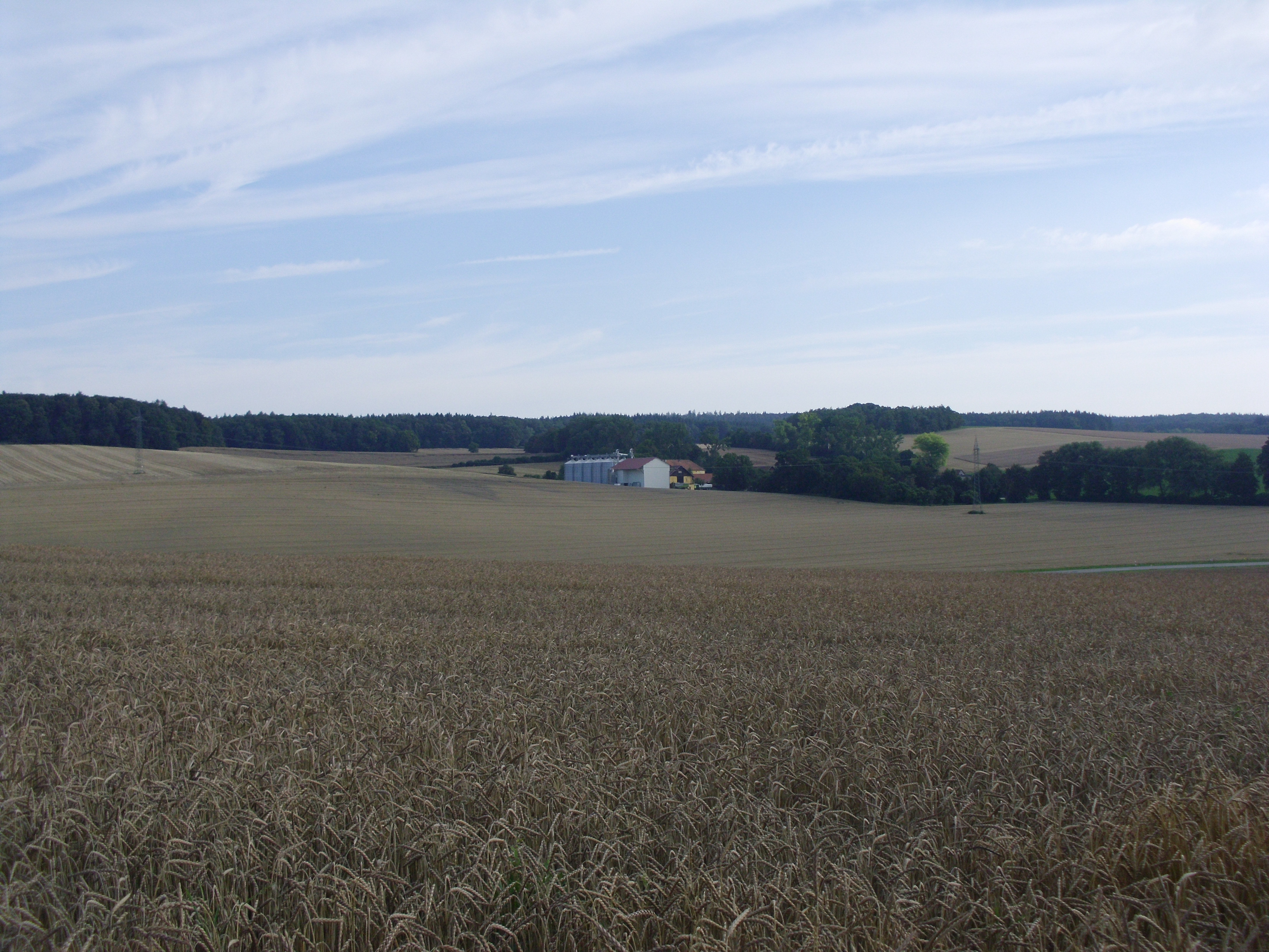 Hofgut Dittenfeld, Ortsteil von Rennertshofen im Landkreis Neuburg-Schrobenhausen